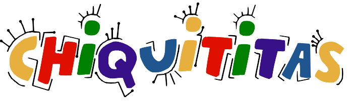 cuarto logo de la serie de Chiquititas.